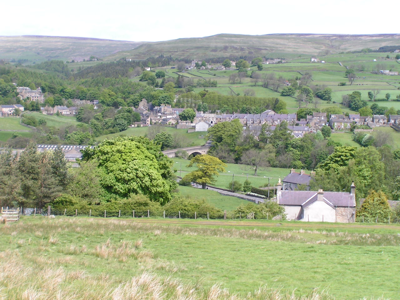 Middleton-in-Teesdale, Co. Durham